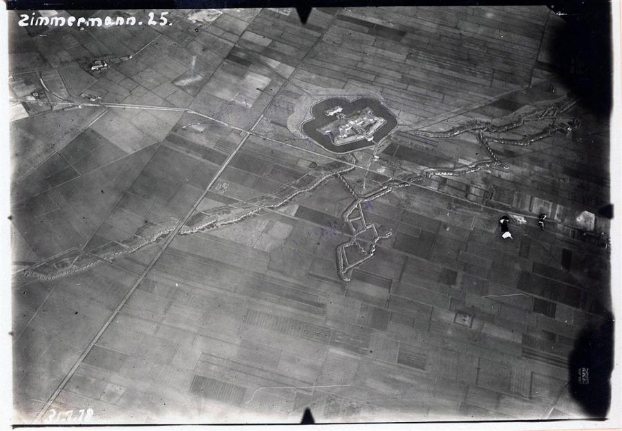 Вид на форт Стабрек с дирижабля. Около форта видны линии окопов.